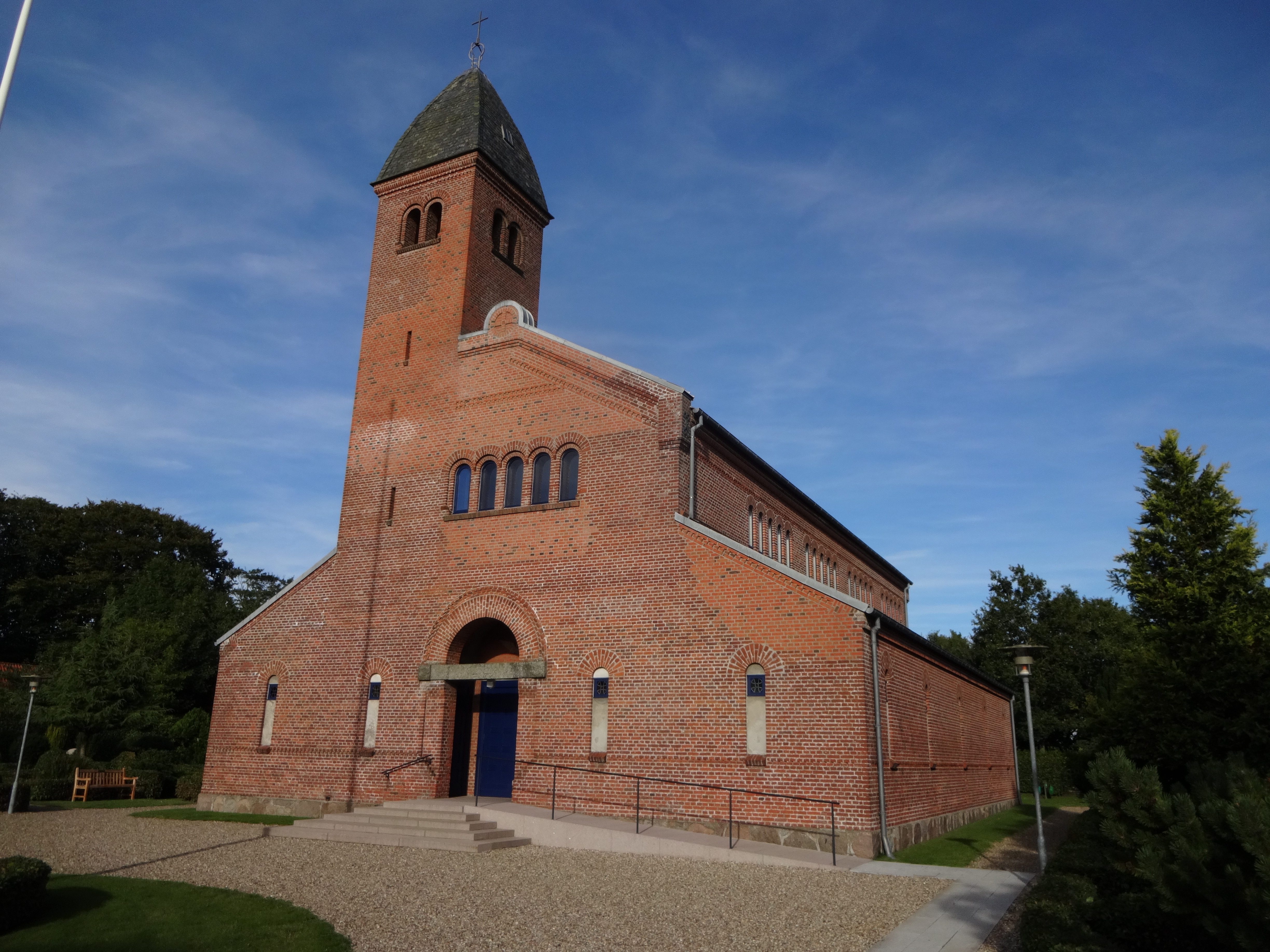 Askov Kirke